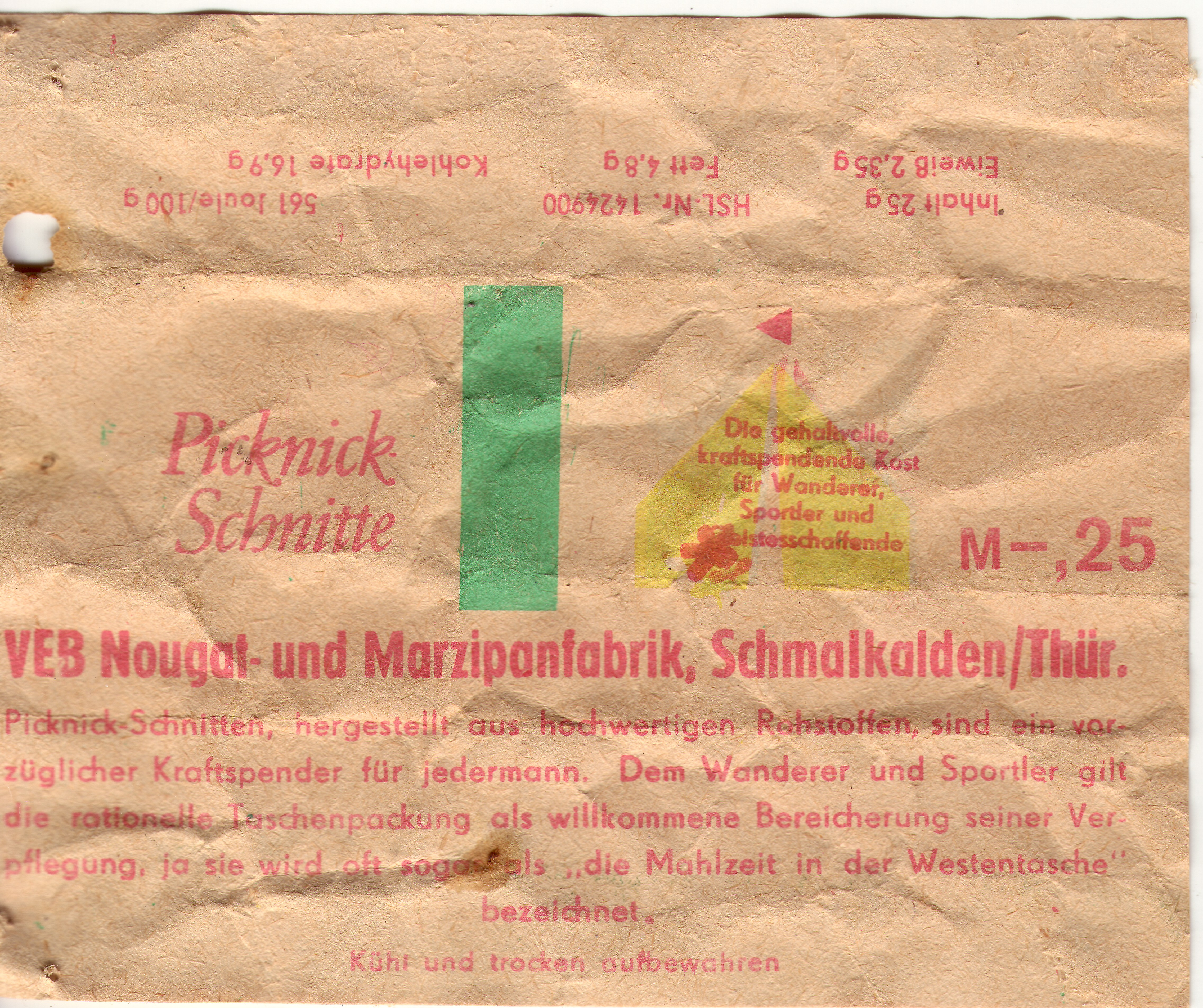 Schmalkalden: VEB Nougat- und Marzipanfabrik, Verpackung einer Picknick-Schnitte. "Die gehaltvolle, kraftspendende Kost für Wanderer, Sportler und Geistesschaffende". ... "Dem Wanderer und Sportler gilt die rationelle Taschenpackung als willkommene Bereicherung seiner Verpflegung, ja sie wird oft sogar als 'die Mahlzeit in der Westentasche' bezeichnet." Preis: M -,25